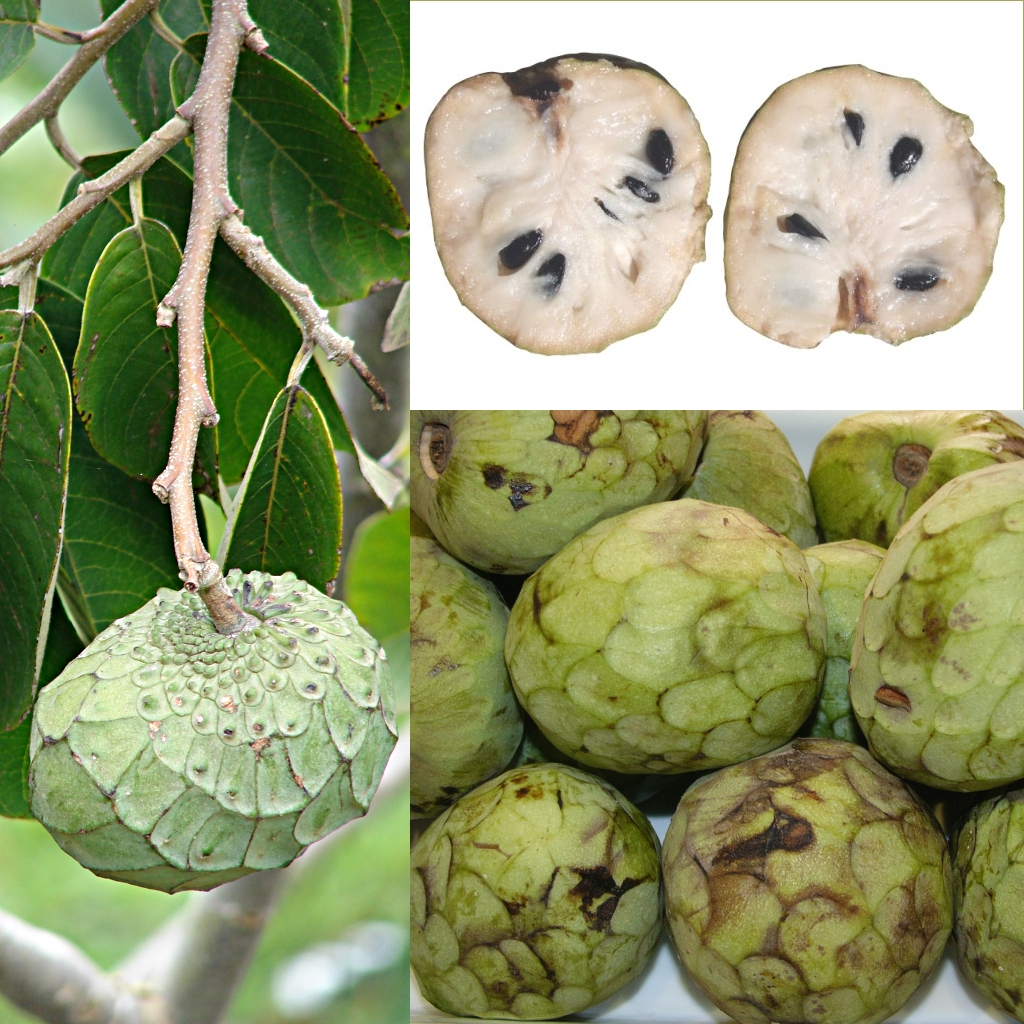 Grafika podręcznika Wikijunior:Owoce. Owoc: czerymoja, cherymoja, jabłko budyniowe. Roślina: flaszowiec peruwiański (Annona cherimola).